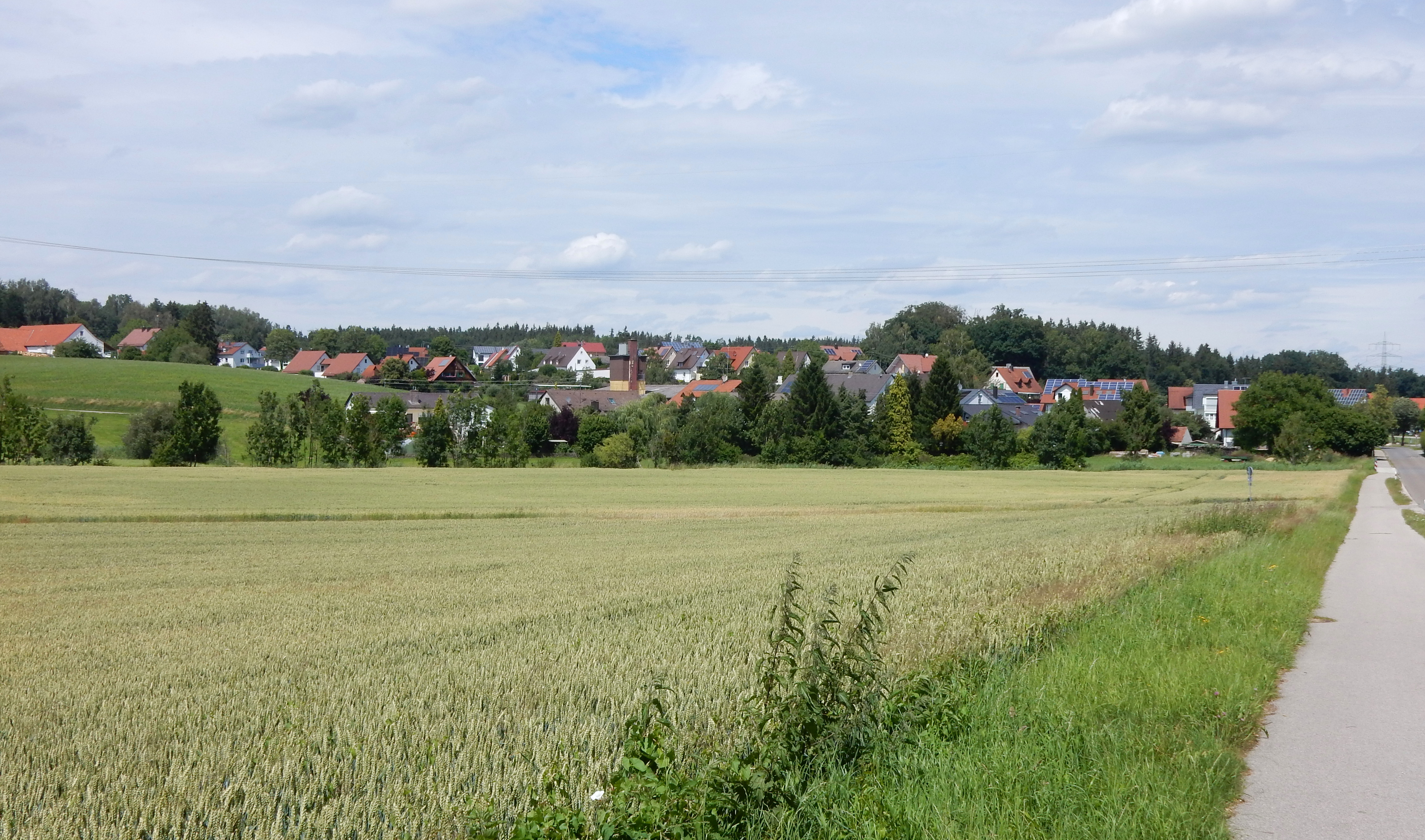 Hügelshart, gesehen aus Südwesten. Hügelshart ist ein Ortsteil von Friedberg (Bayern).